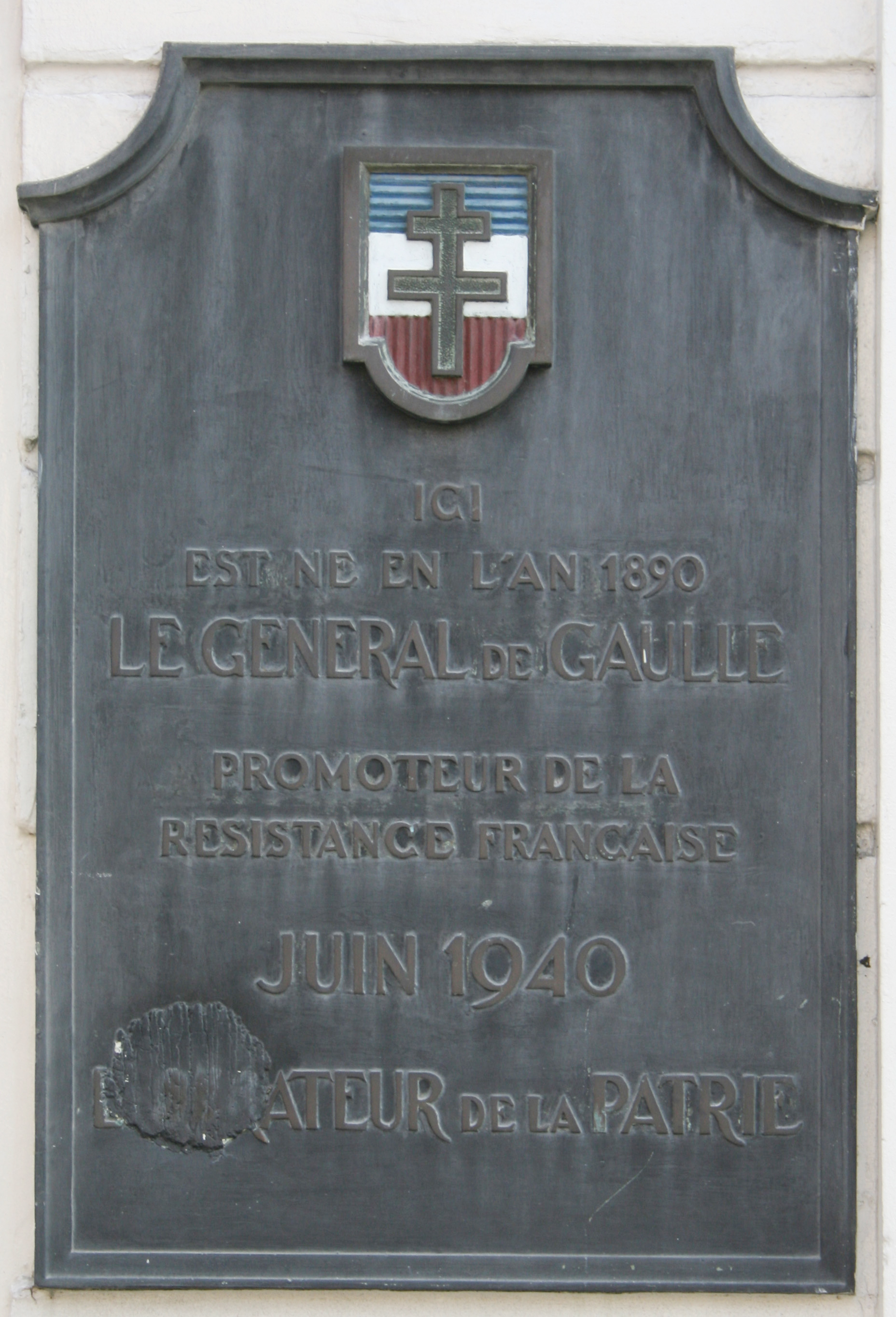 Gedenktafel am Geburtshaus von Charles de Gaulle in Lille